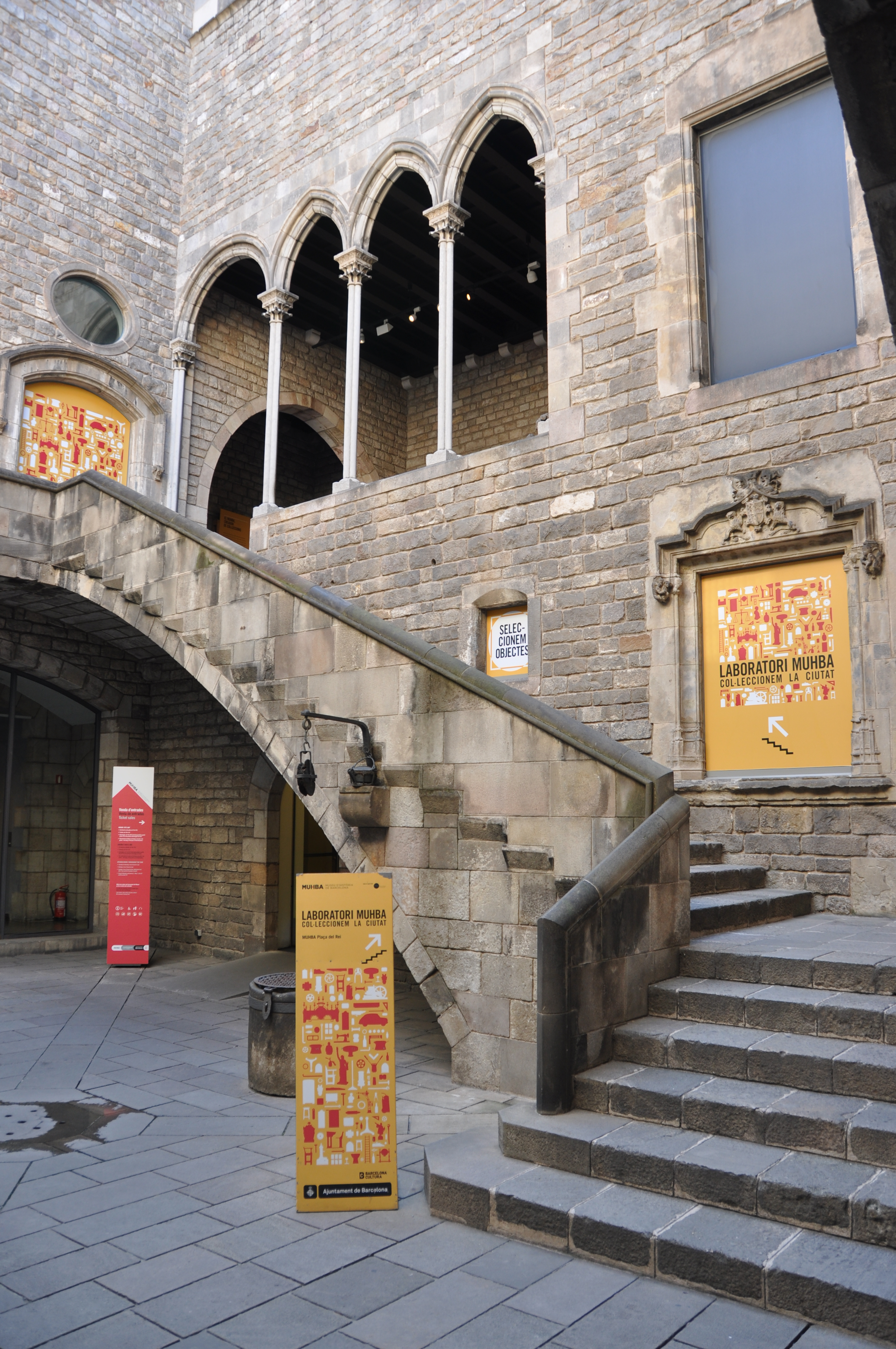 Pati de la Casa Padellàs. Escala i galeria. Exposició Laboratori MUHBA